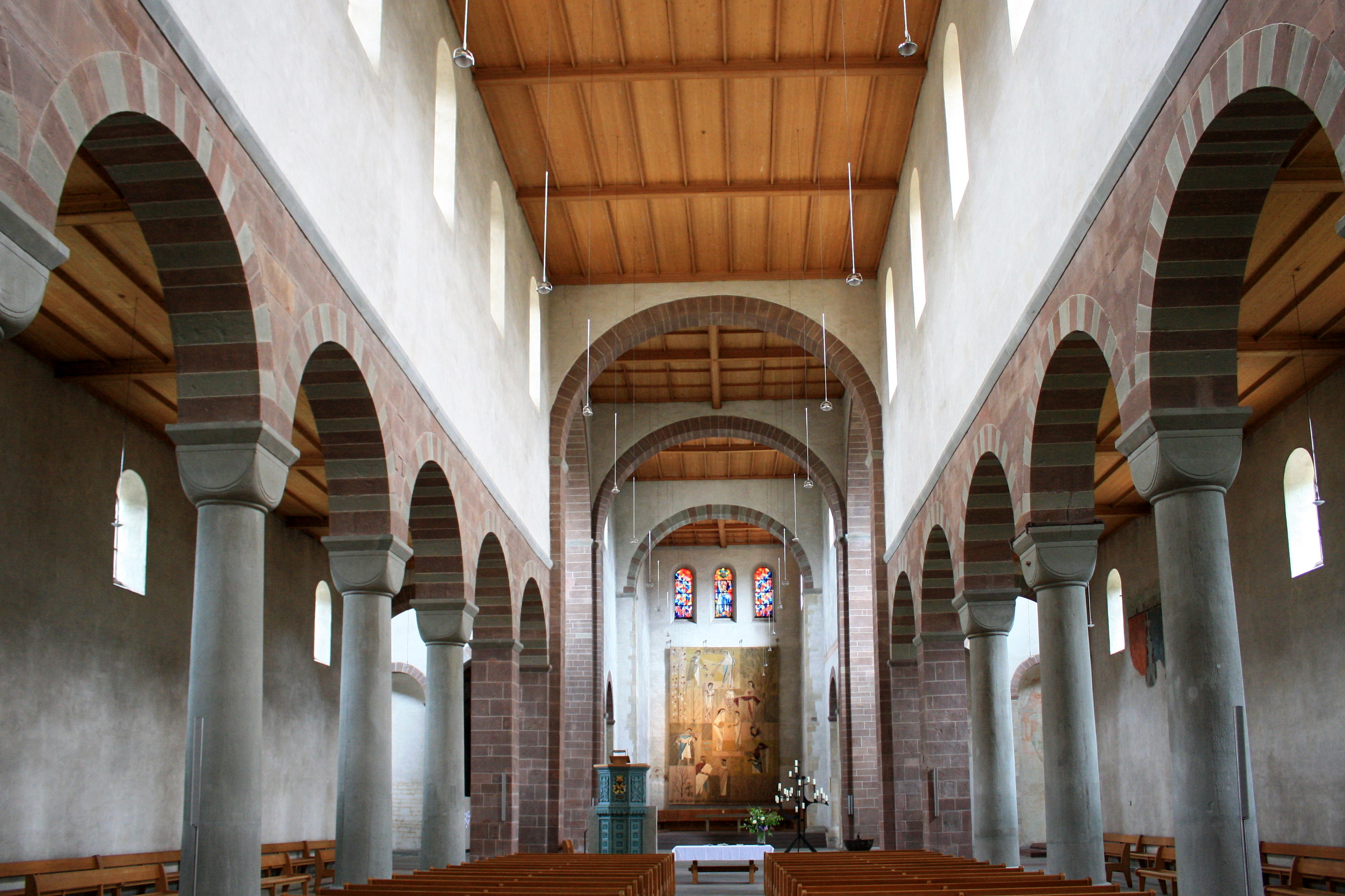 Kloster Allerheiligen in Schaffhausen (Switzerland)